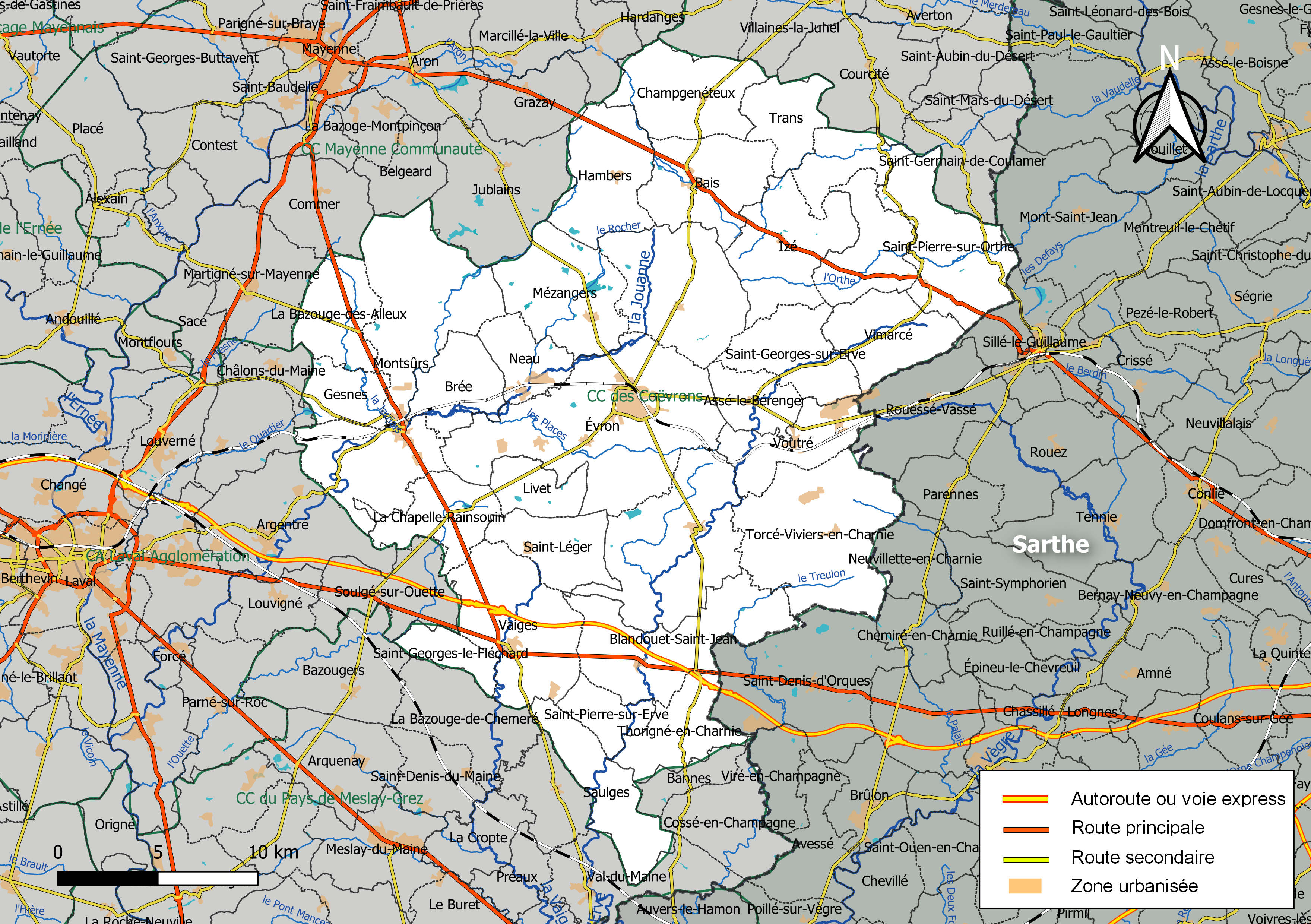 Carte géographique de la Communauté de communes des Coëvrons, département de la Mayenne, France. Composition au 1er janvier 2019.